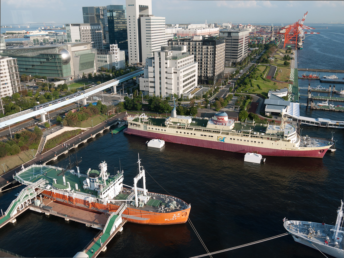 「船の科学館」に保存されている「宗谷」と「羊蹄丸」。